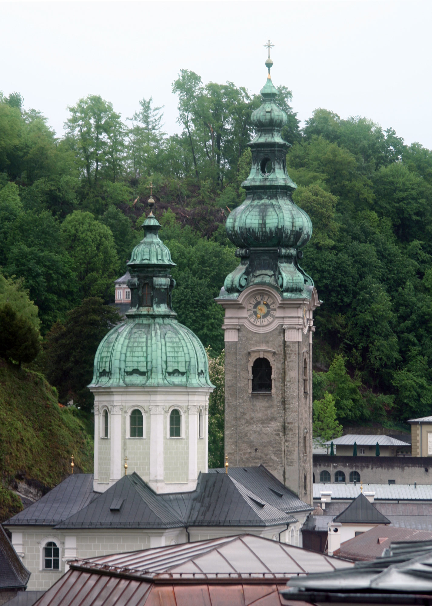 Stift_Sankt_Peter